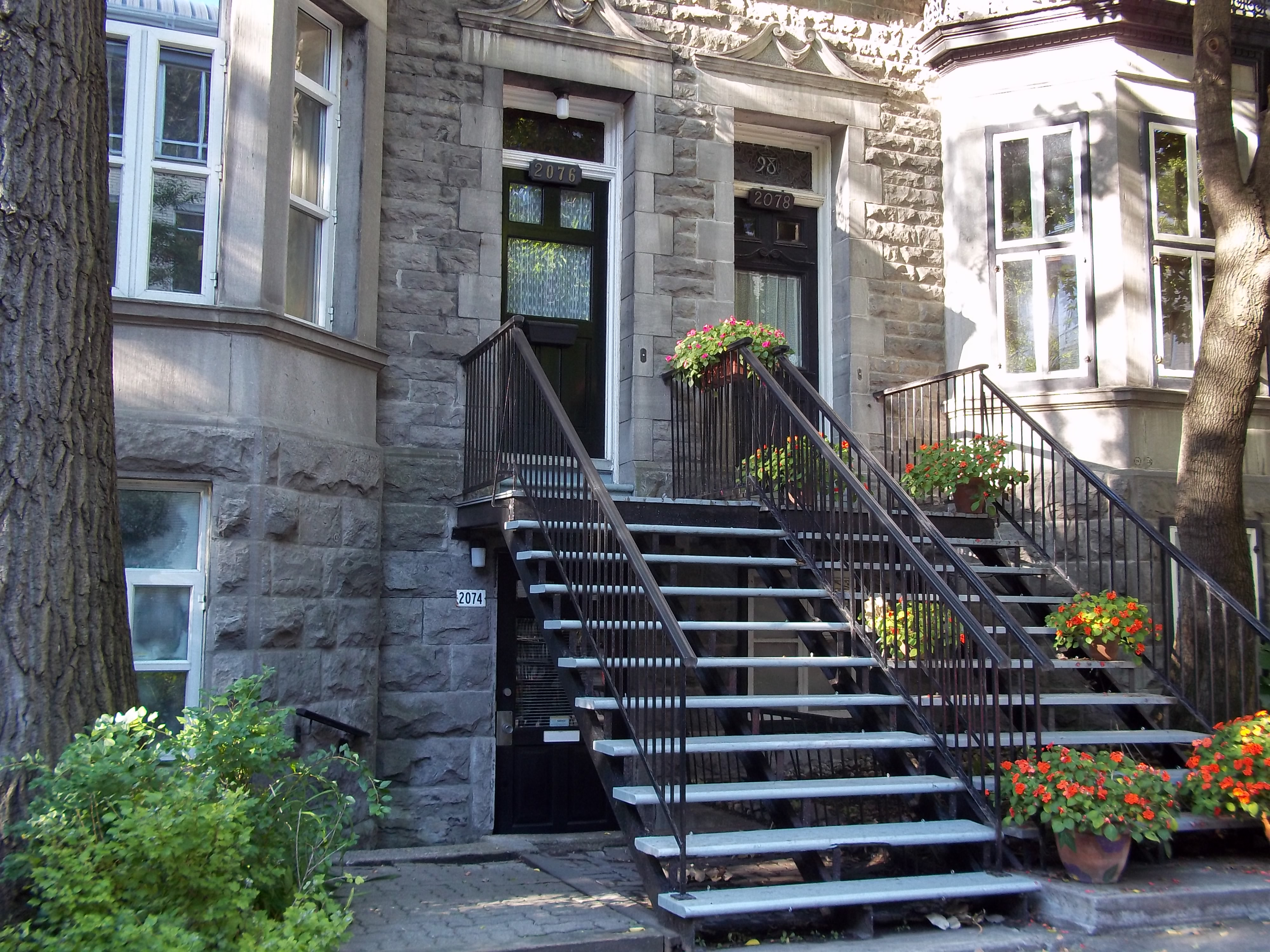 Maisons Charles-Sheppard. À gauche, celle du 2074-2076, rue Jeanne-Mance. À droite, celle du 2078, rue Jeanne-Mance, Montréal.